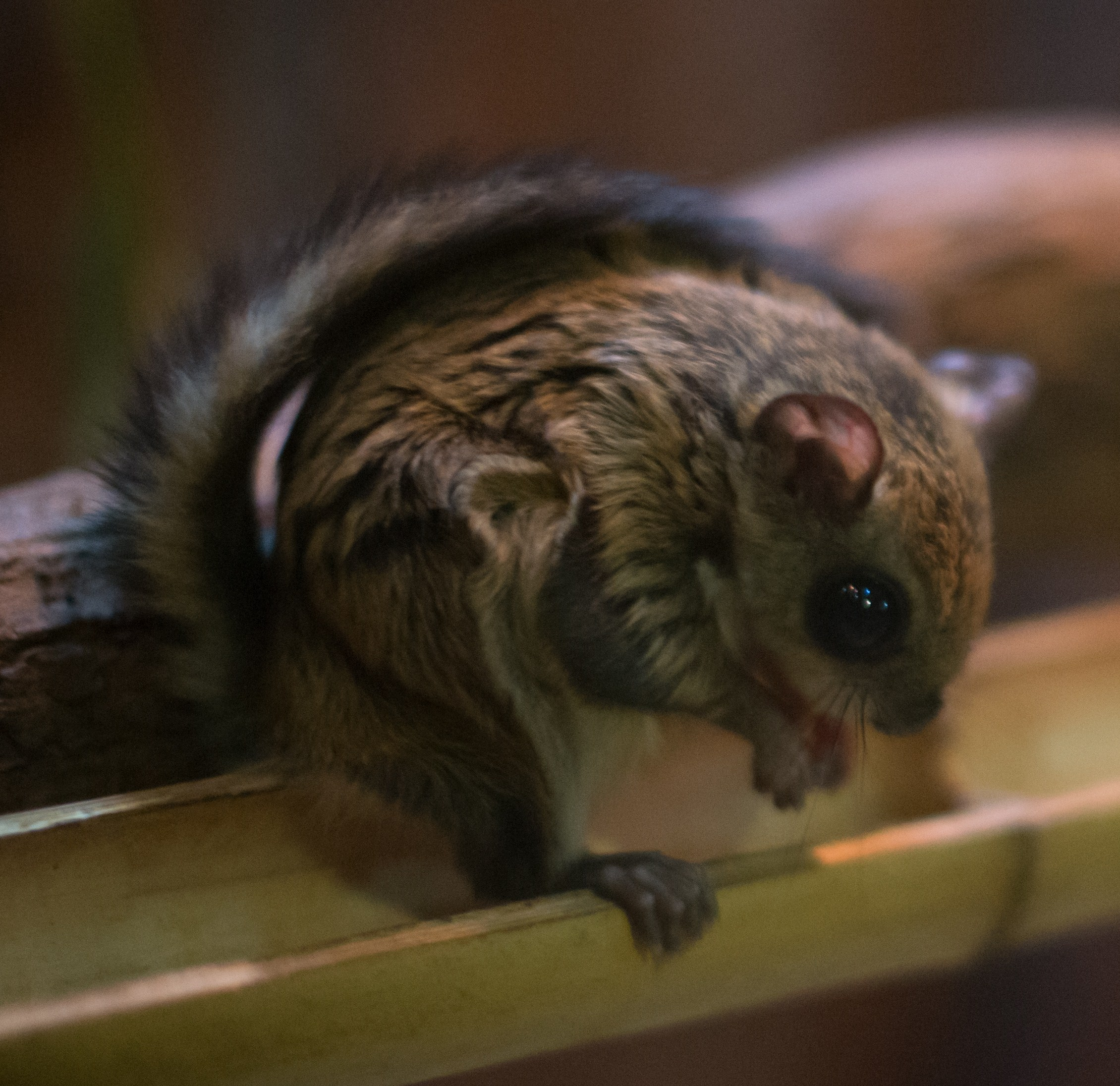 Японская летяга (Pteromys momonga)